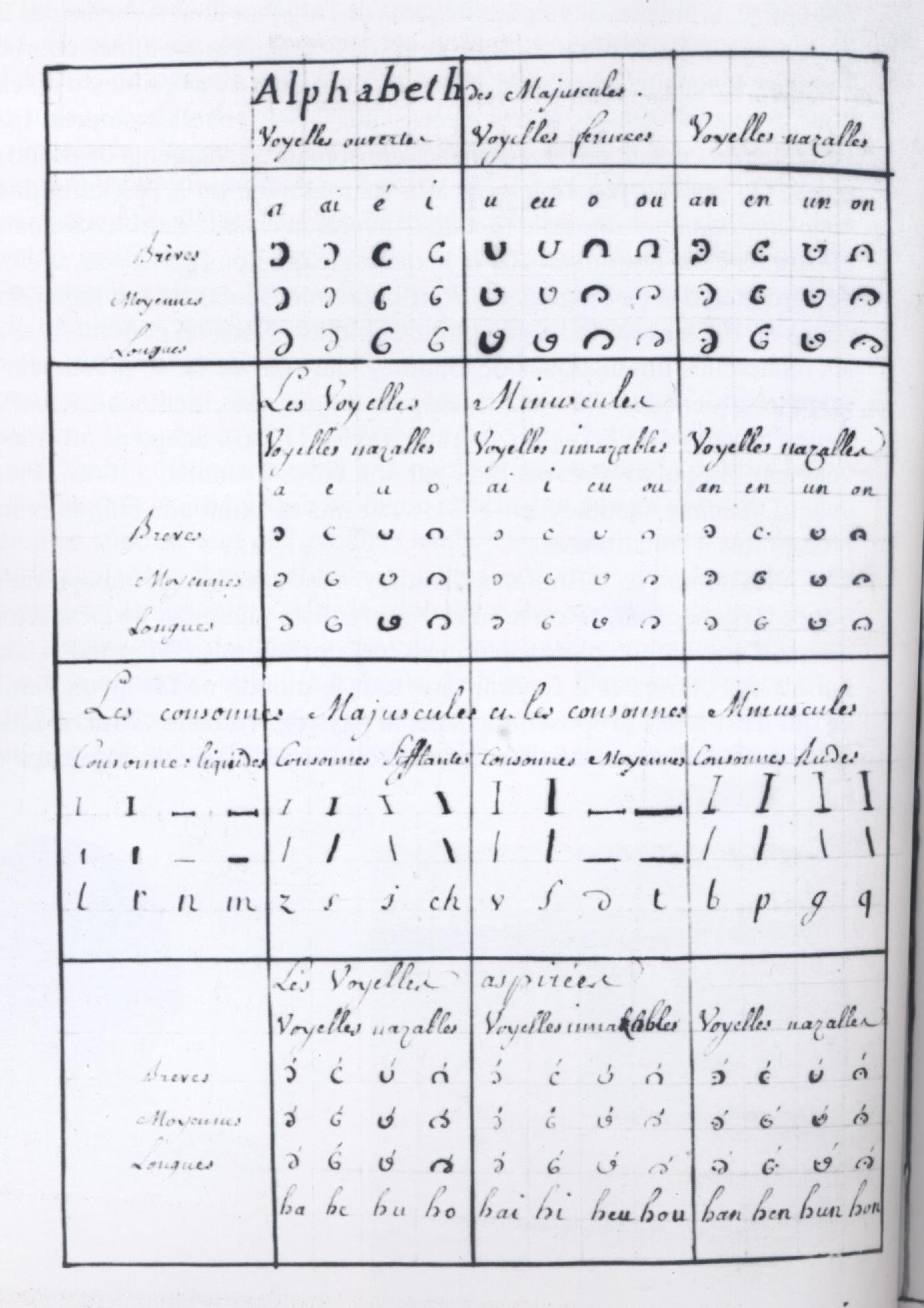 Projekto de nova lingvo 1774